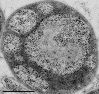 Micrografia electrónica de una sección de célula de G. obscuriglobus Escala barra: 500 nm.